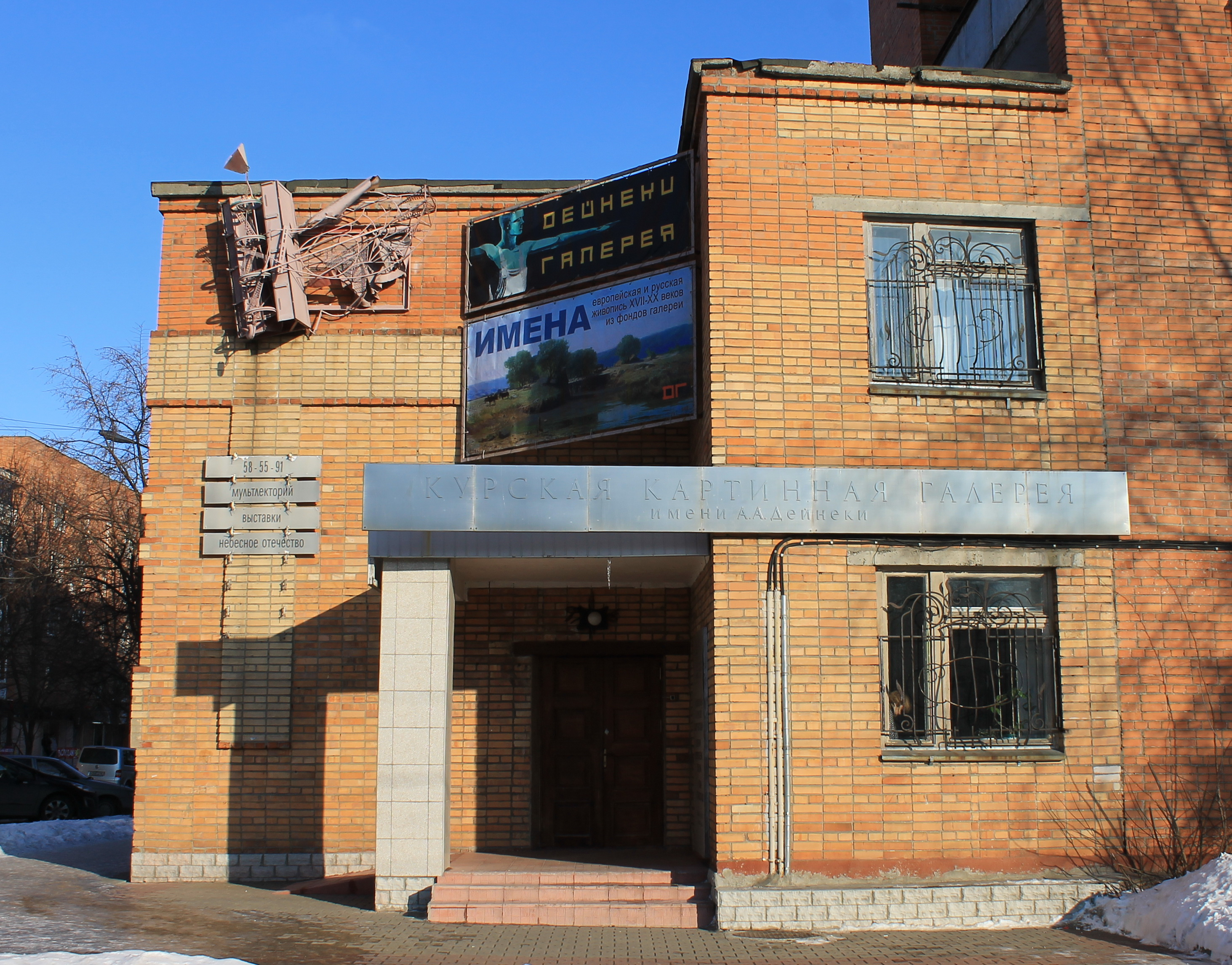 Курская областная картинная галерея им. А.А. Дейнеки. Выставочный зал на ул. Радищева, 85